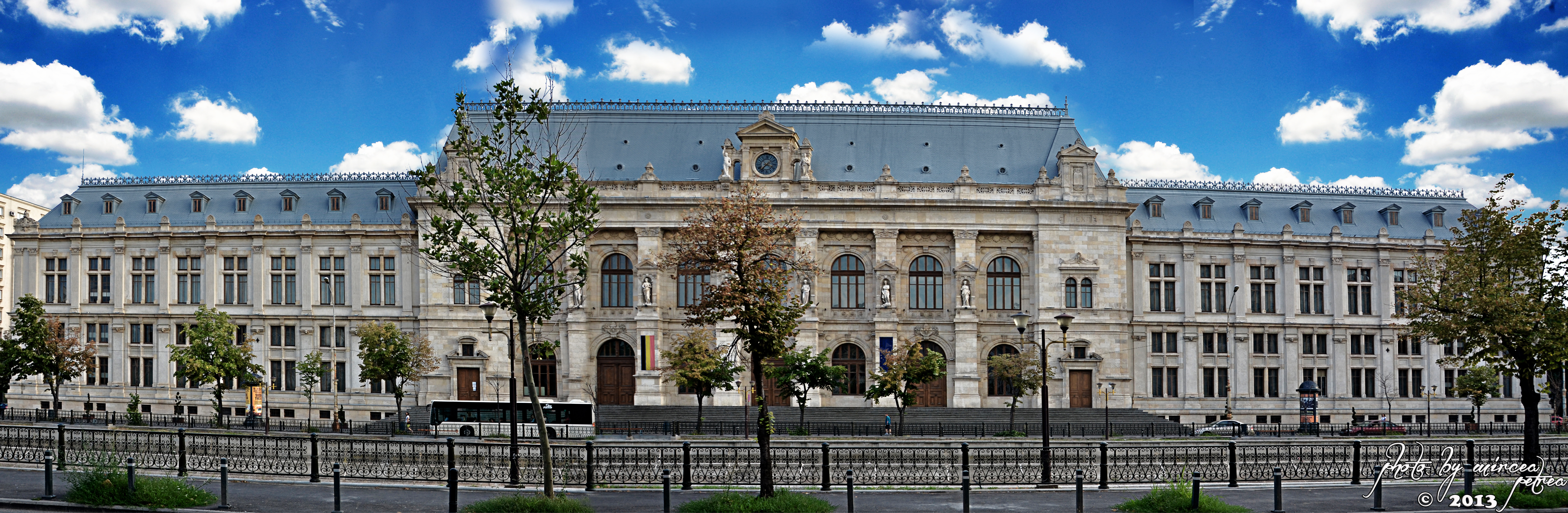 Palatul de Justiție a fost construit între anii 1890–1895 după planurile arhitecților Albert Ballu (același arhitect care a conceput Palatul de Justiție din Charleroi, Belgia) și Ion Mincu, care a condus și lucrările de construcție și a desenat și schițele decorațiunilor interioare, respectiv plafoane, pardoseli, balustrade, scări, mobilier.